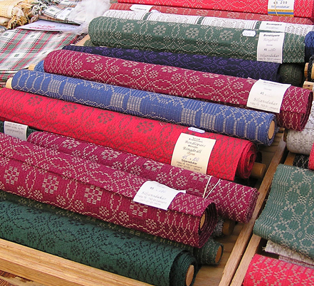 Daldrällsdukar på Strängnäs marknad, okt 2004. Foto Klafui Daldräll